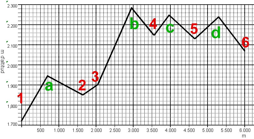 Perfil de la carena de la serra del Verd (Solsonès, Alt Urgell, Berguedà)